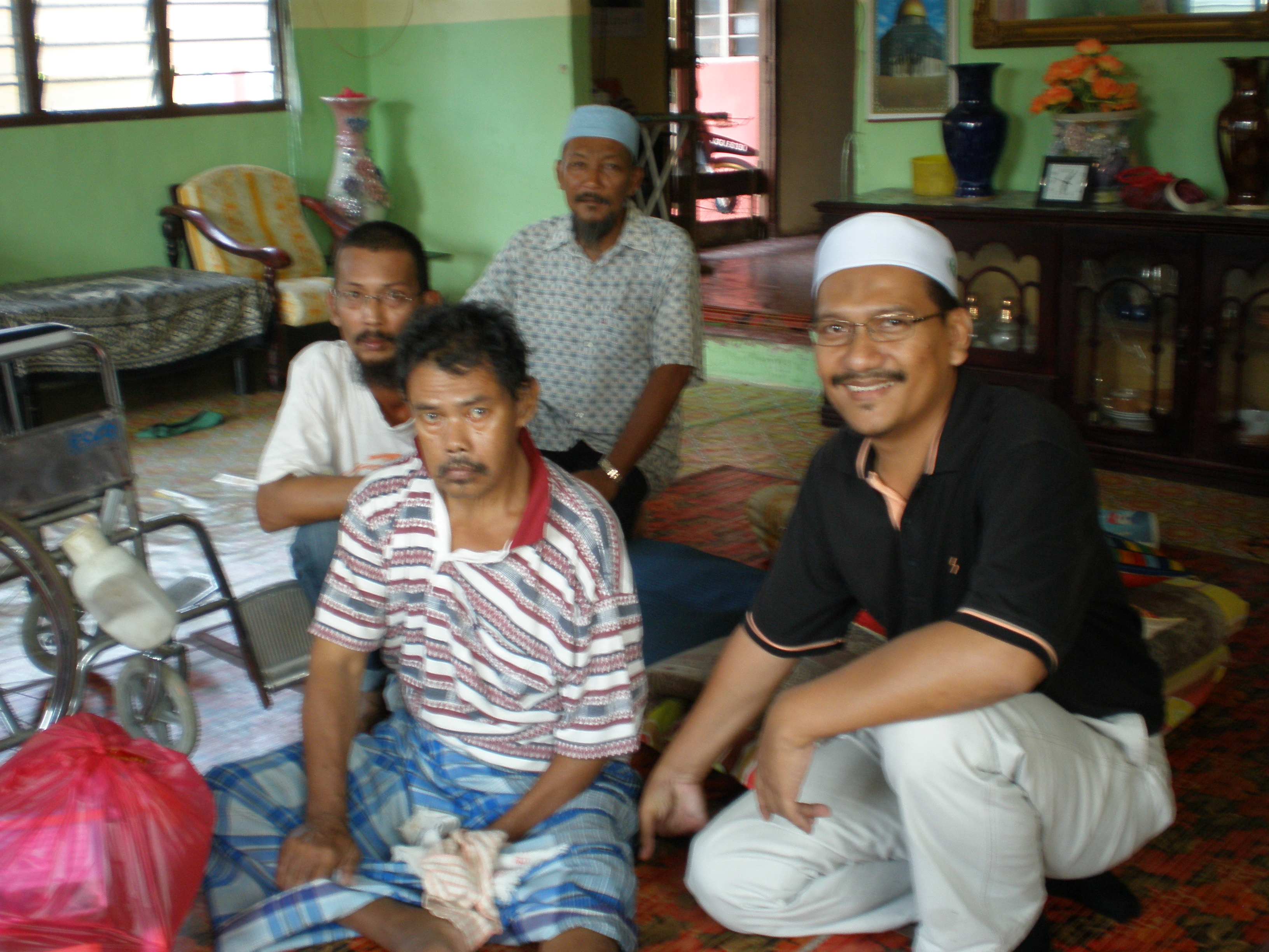 Saudara Hamdan bin Basiran bertemu dengan masyarakat setempat bagi membincangkan masalah